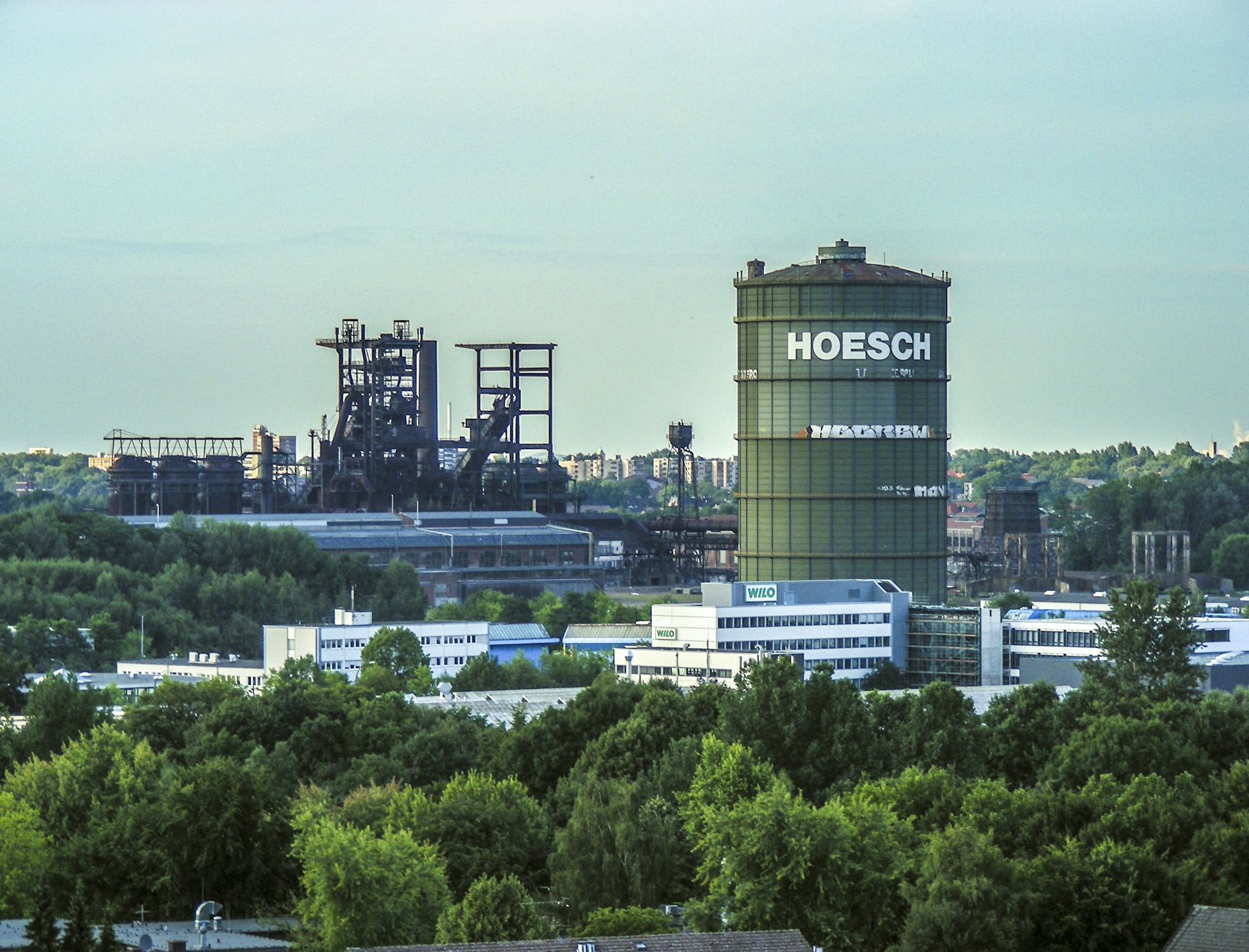 Hochofenwerk Phoenix-West im Sommer This is a photograph of an architectural monument. 0938